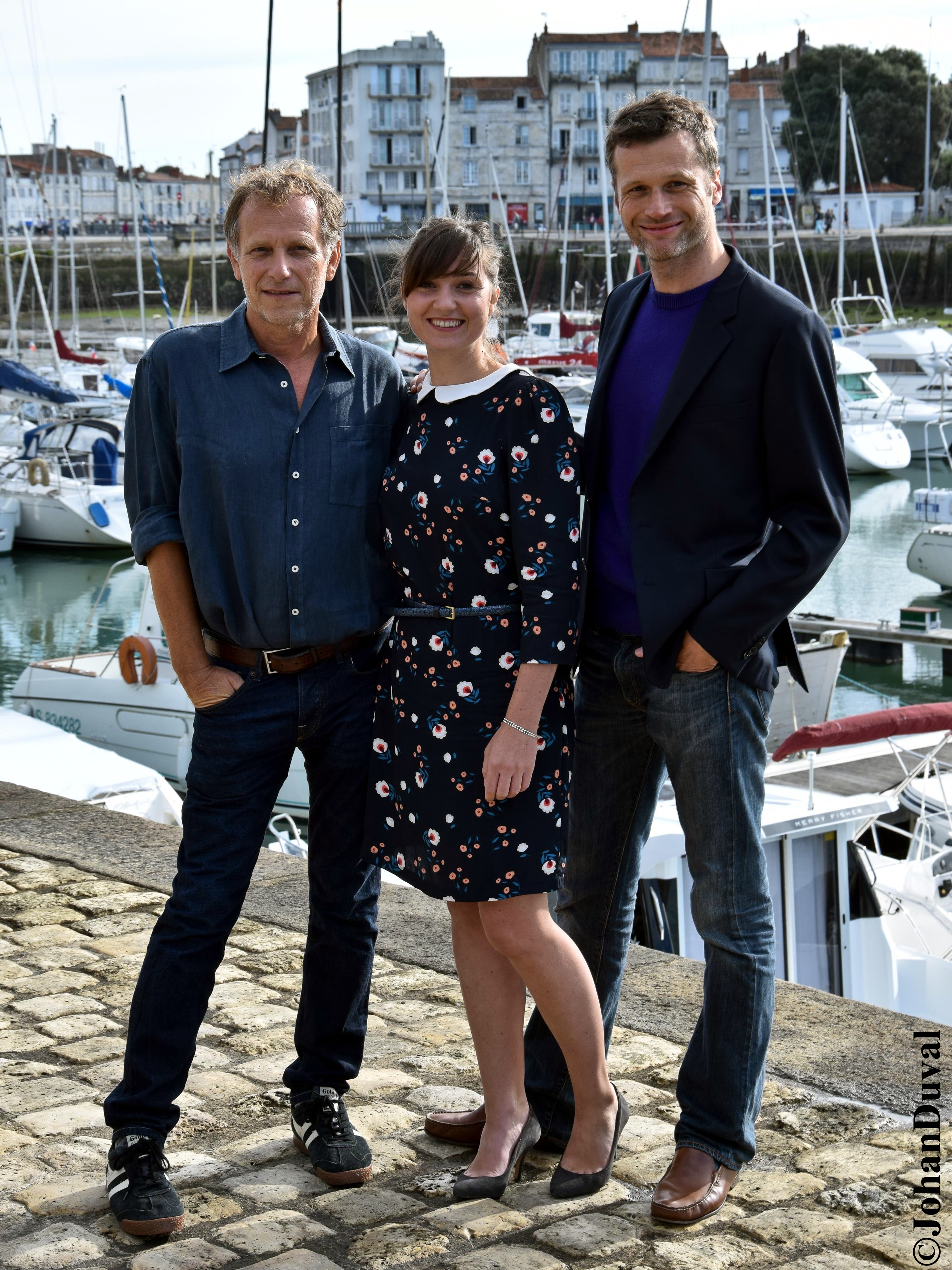 Charles Berling, Nina Meurisse et Robert Plagnol lors de la présentation de Glacé au Festival de la Fiction TV 2016 à La Rochelle